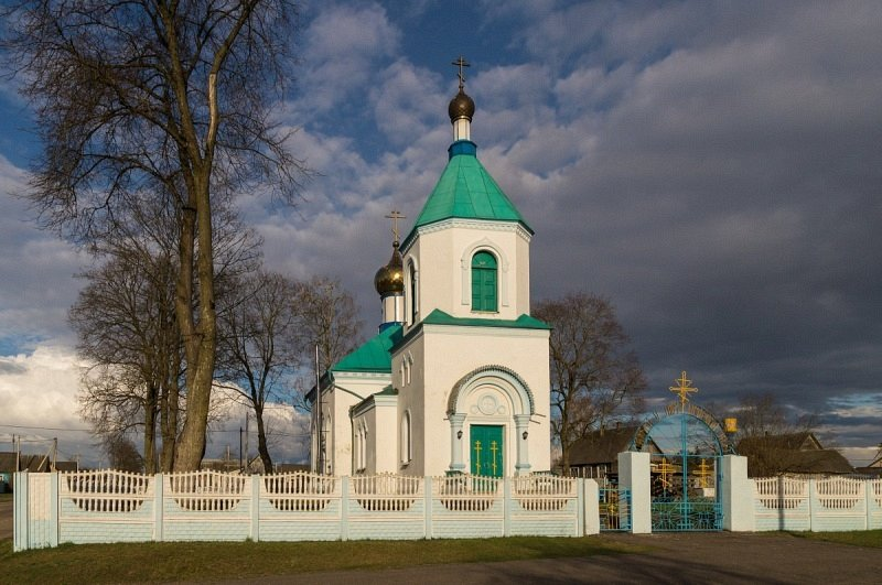 Нарач (Вілейскі раён). Свята-Ільінская царква